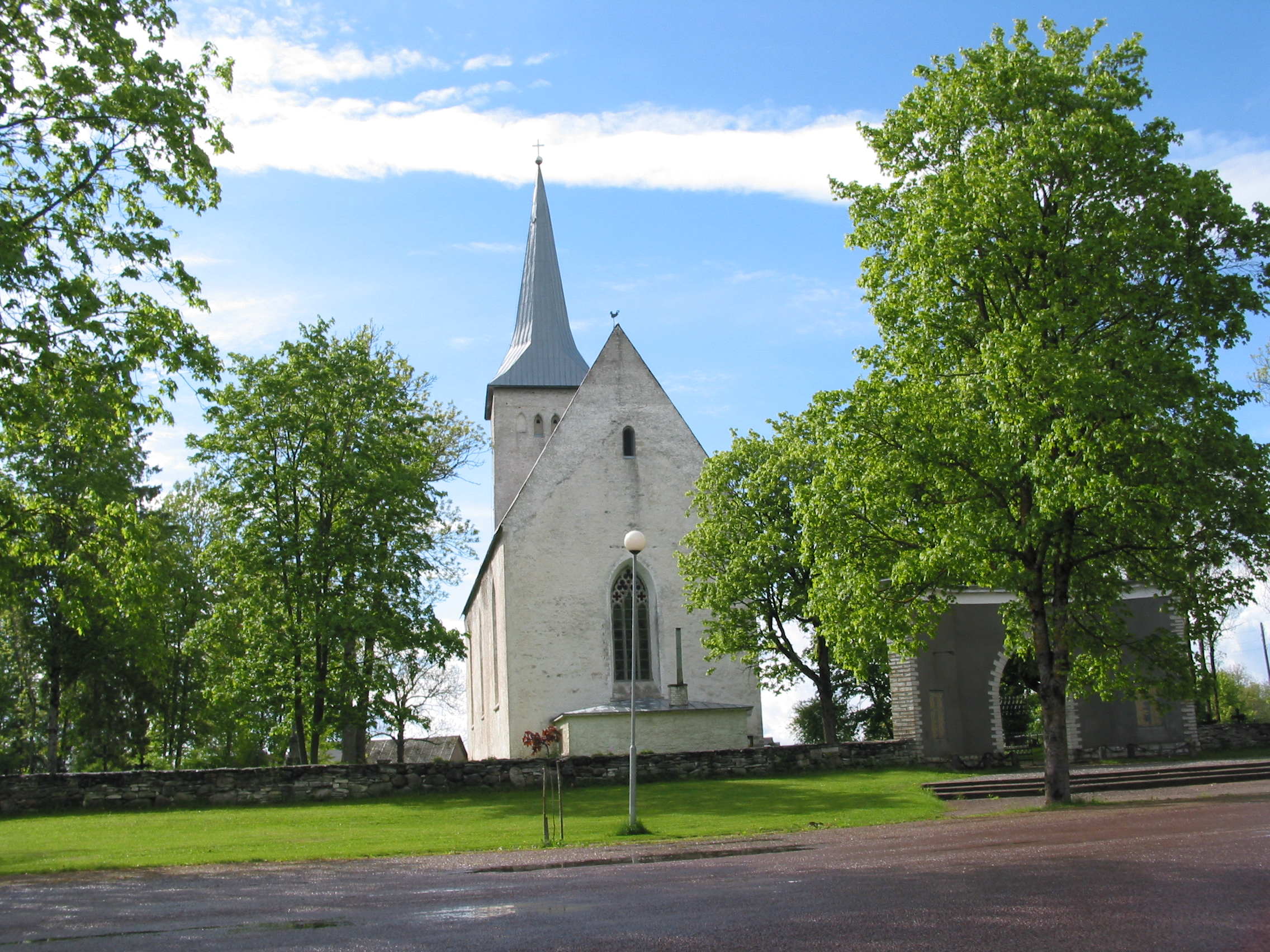 Märjamaa kirik